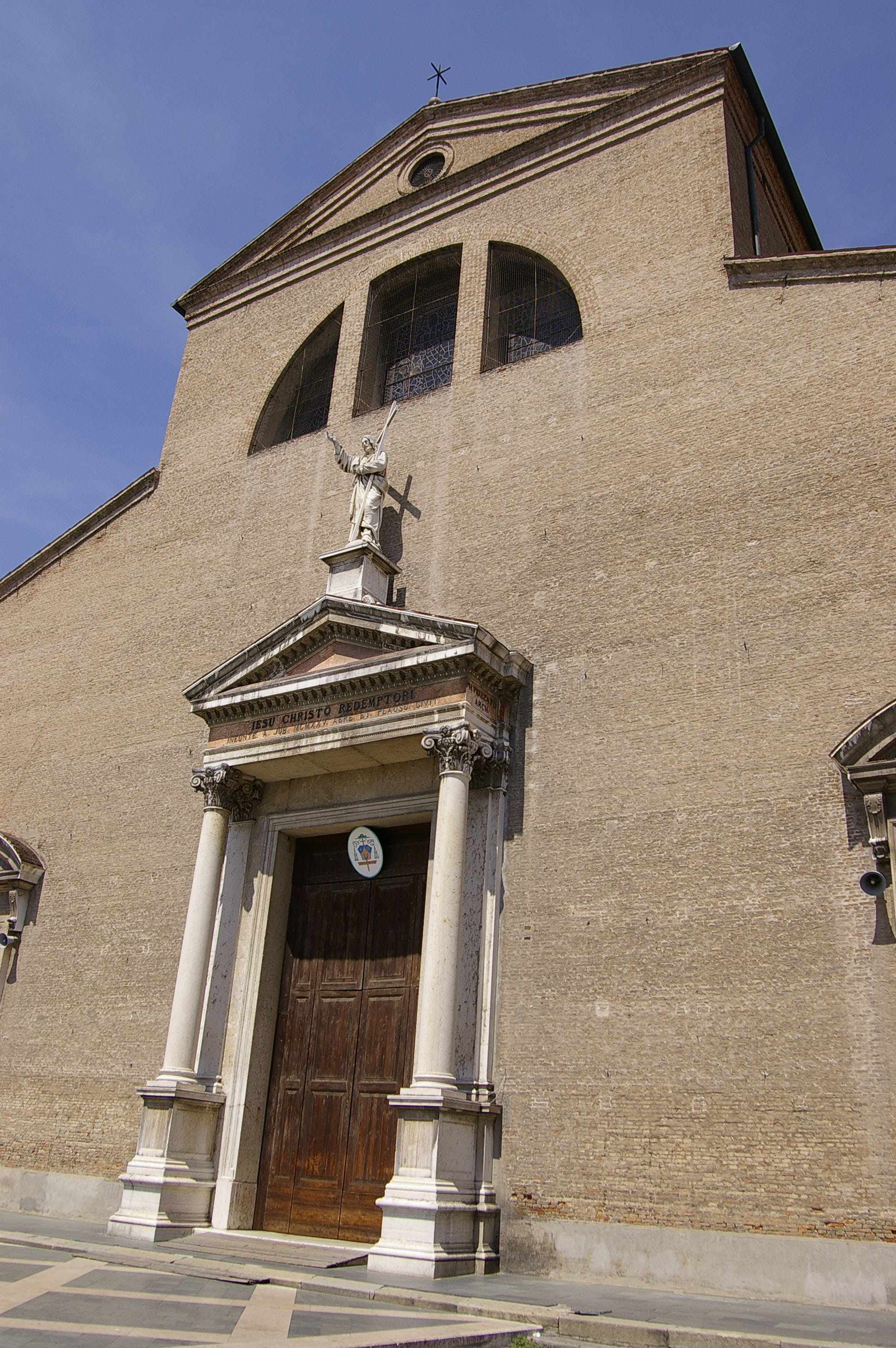 facciata del duomo di adria con particolare in marmo